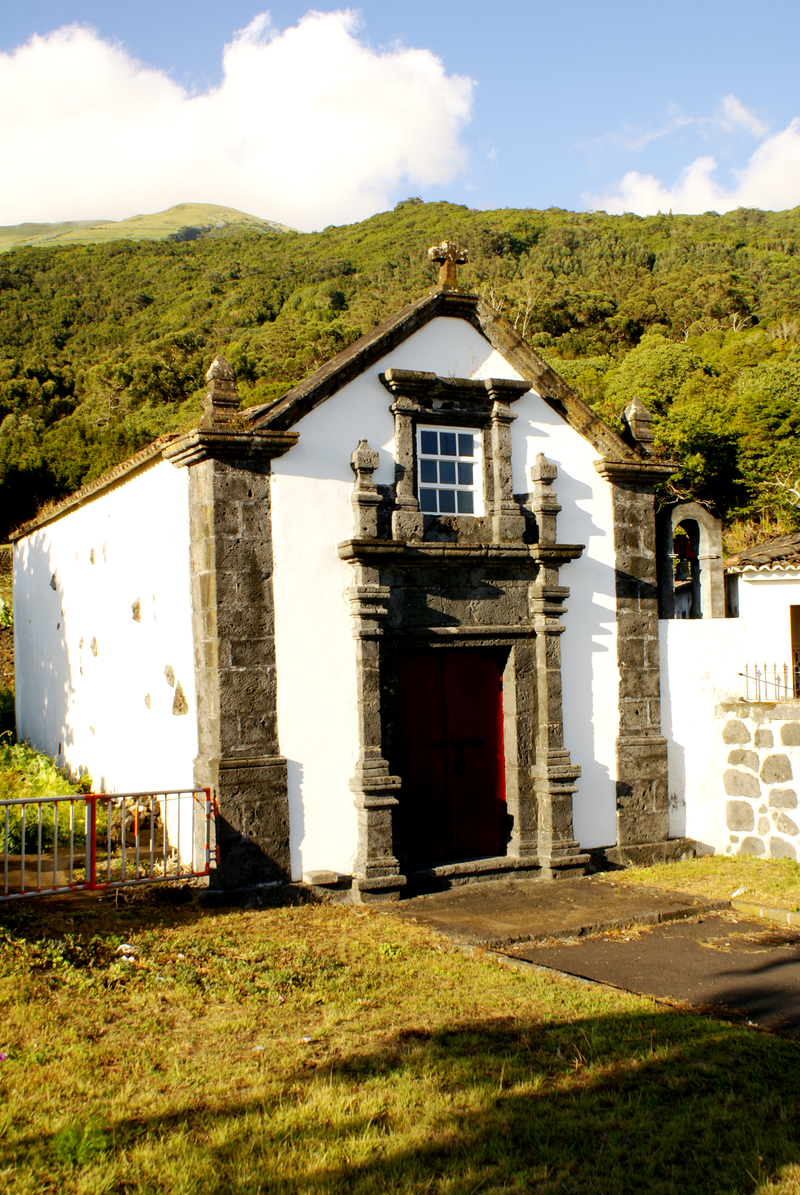 Ermida do Senhor Jesus da Boa Morte, Urzelina, Velas, São Jorge, Açores